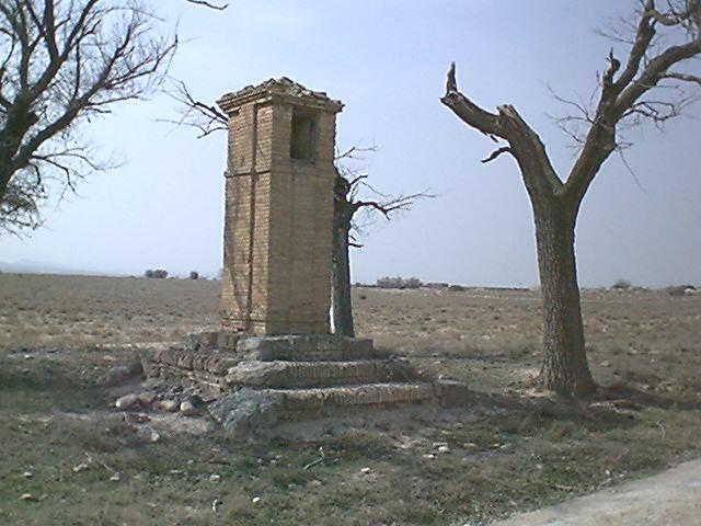 Aragonés: Peirón de Sant Gregorio (Magallón) antes d'a suya restauración en 2016